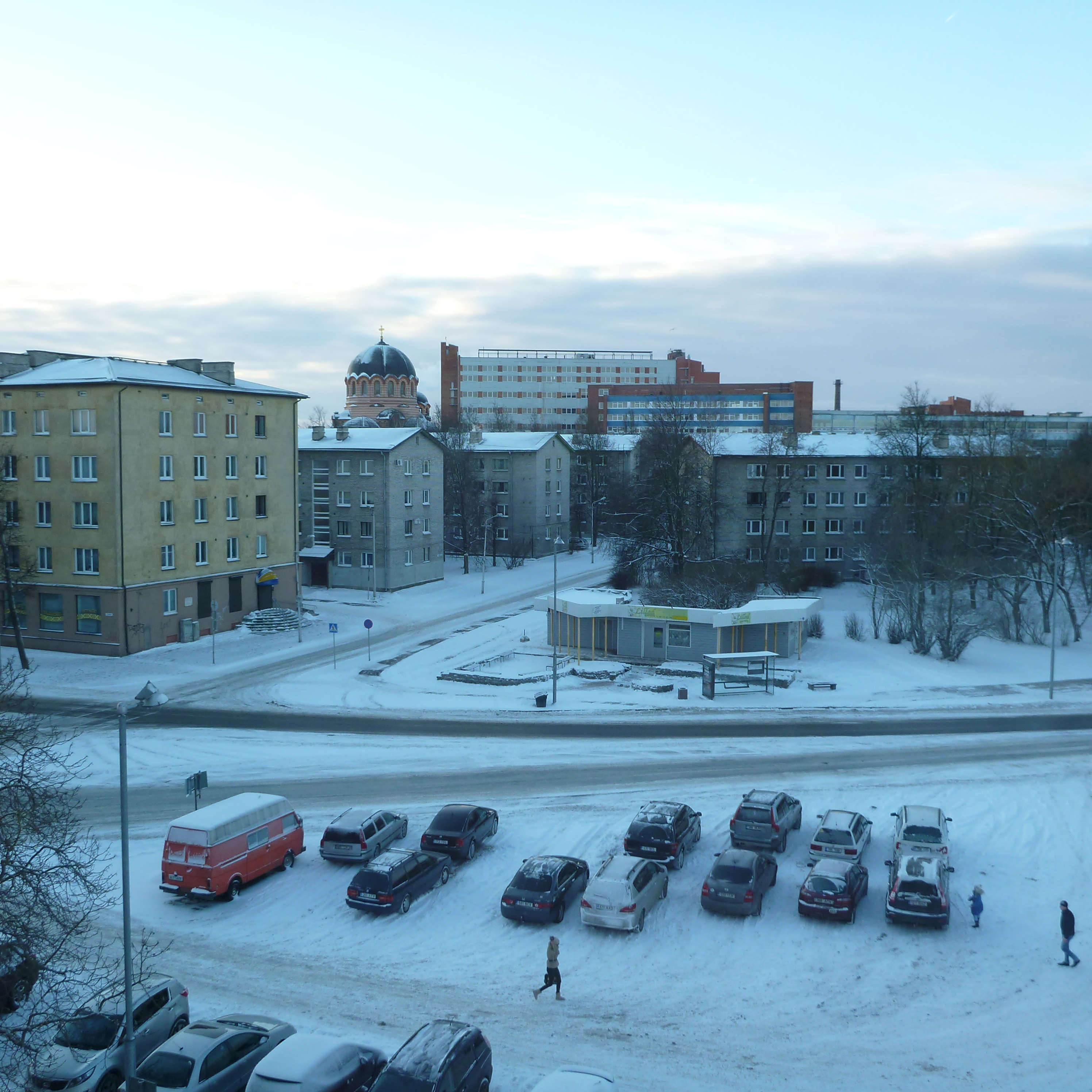 Taloja Narvan keskustassa